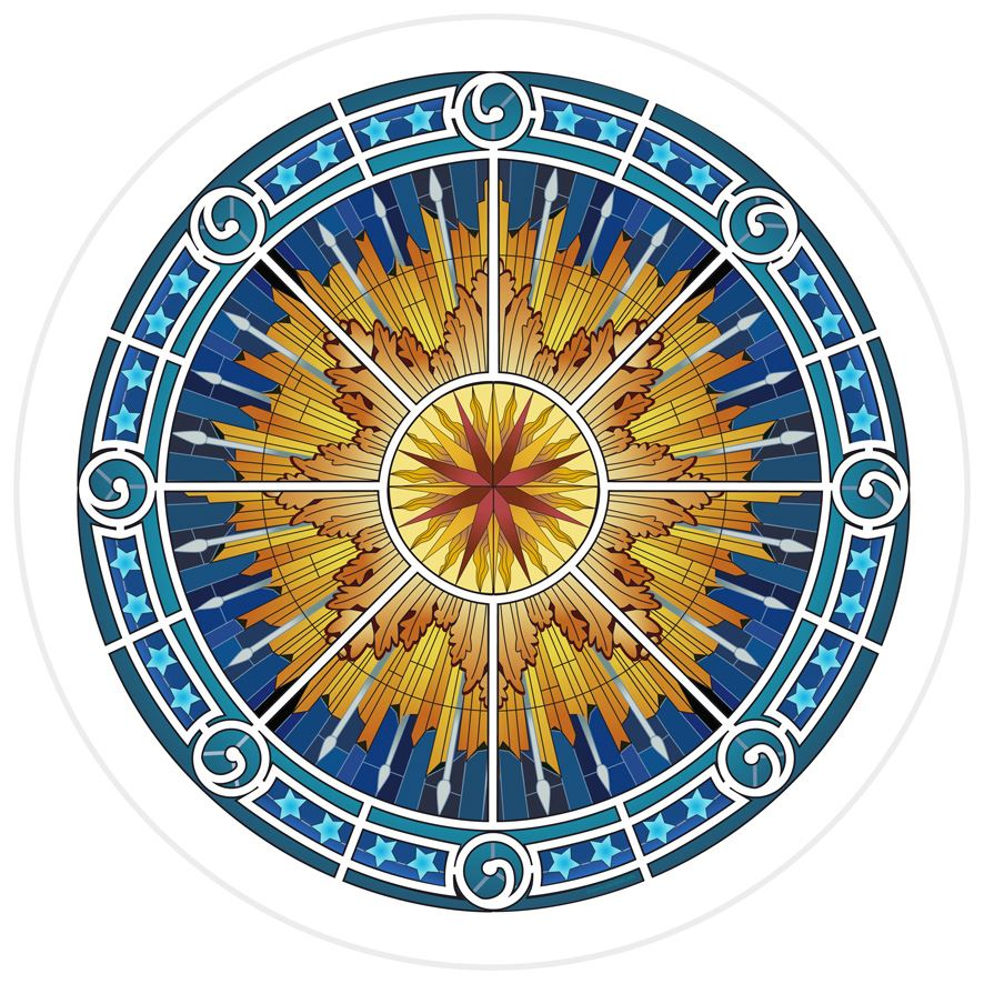 Schématisation de l'ensemble du vitrail. (© 2020 - Paco pao)